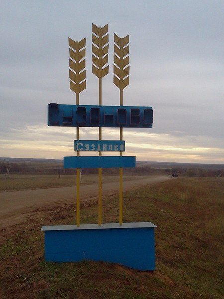 Знак на повороте